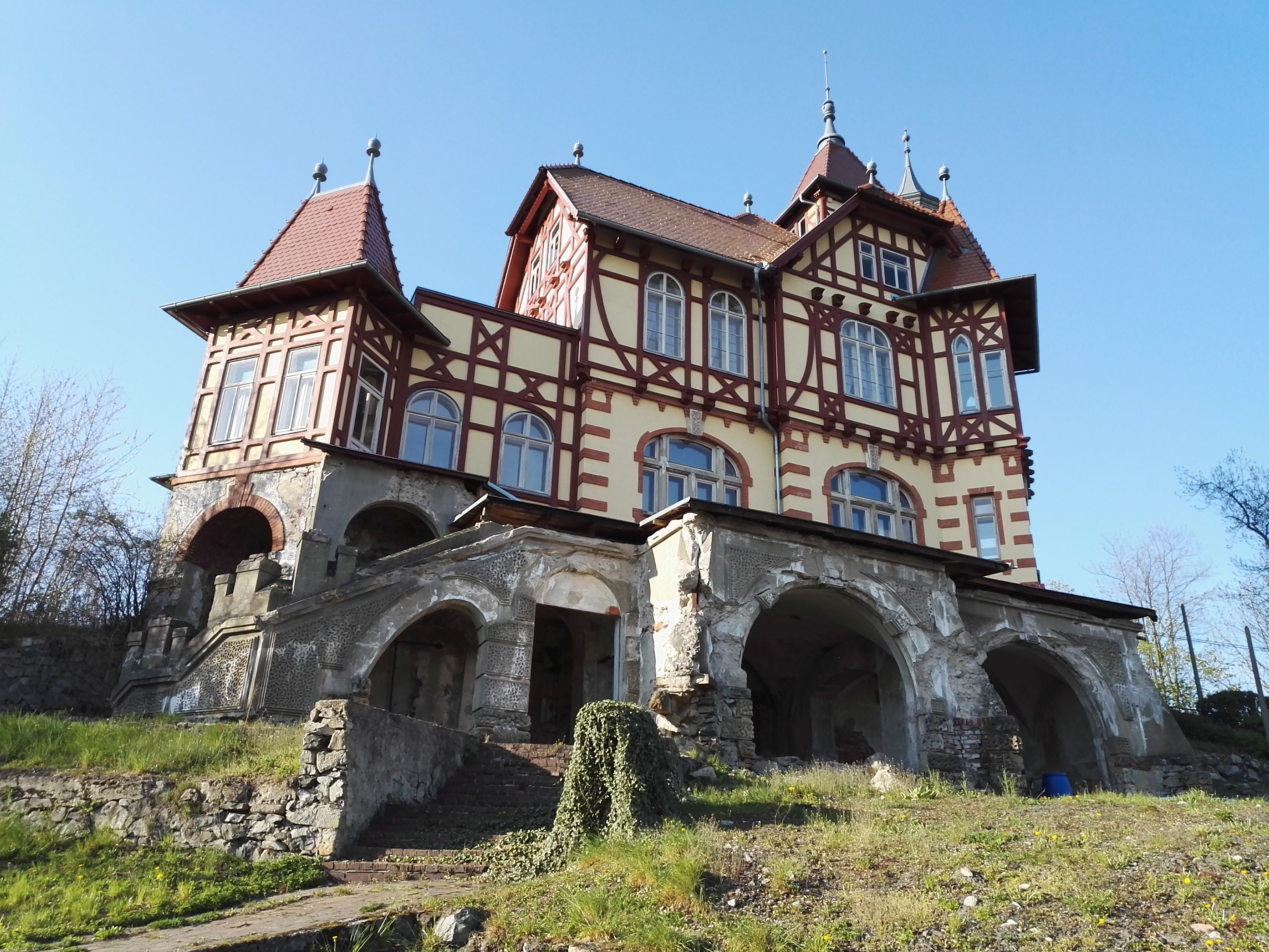 Výletní restaurace na Hrádku ve Varnsdorfu